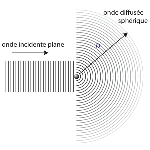 Diffusion par un atome Image créée par Didier Lairez.